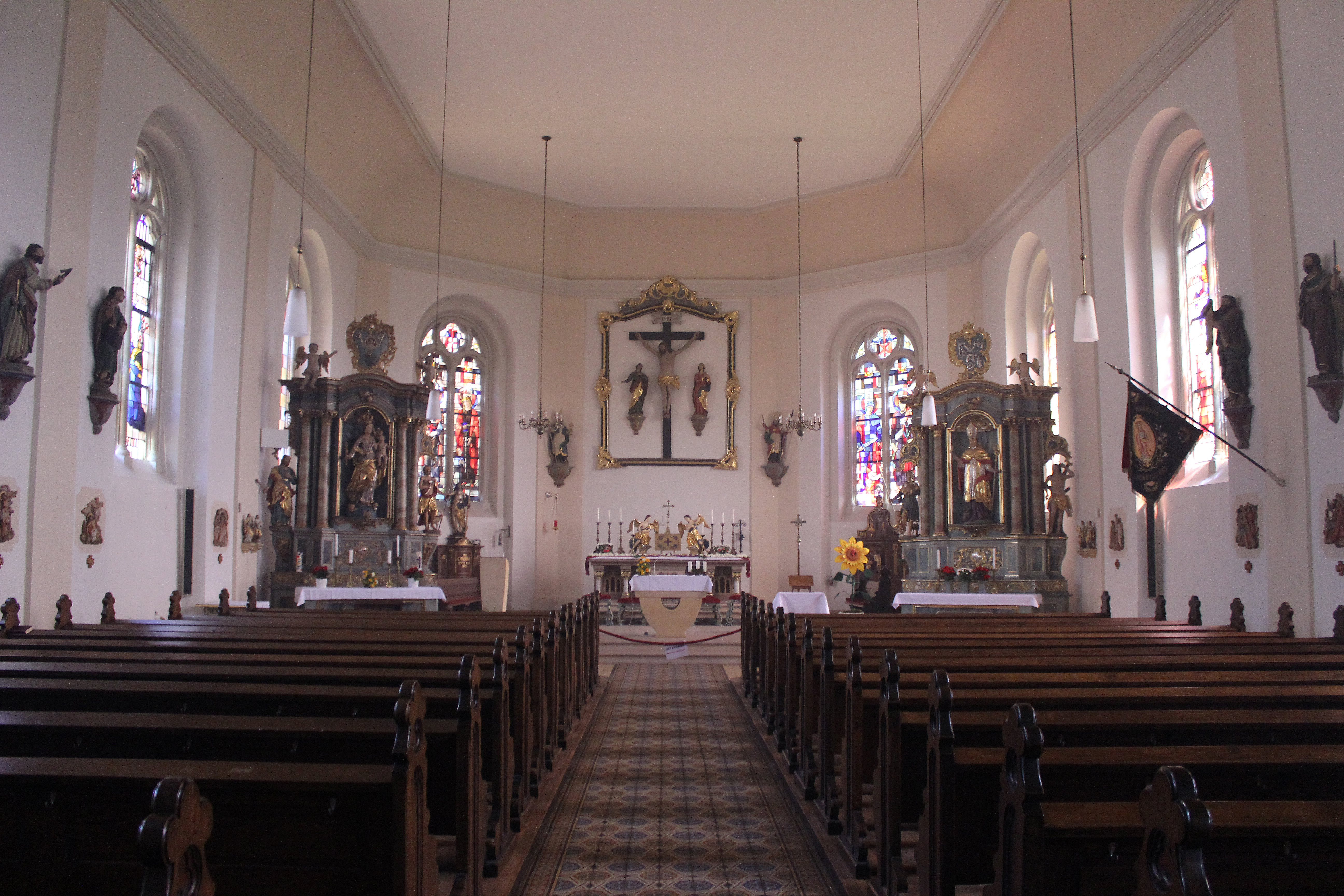 Blick ins Innere der katholischen Pfarrkirche St. Martin in Berus, einem Ortsteil der Gemeinde Überherrn, Landkreis Saarlouis, Saarland